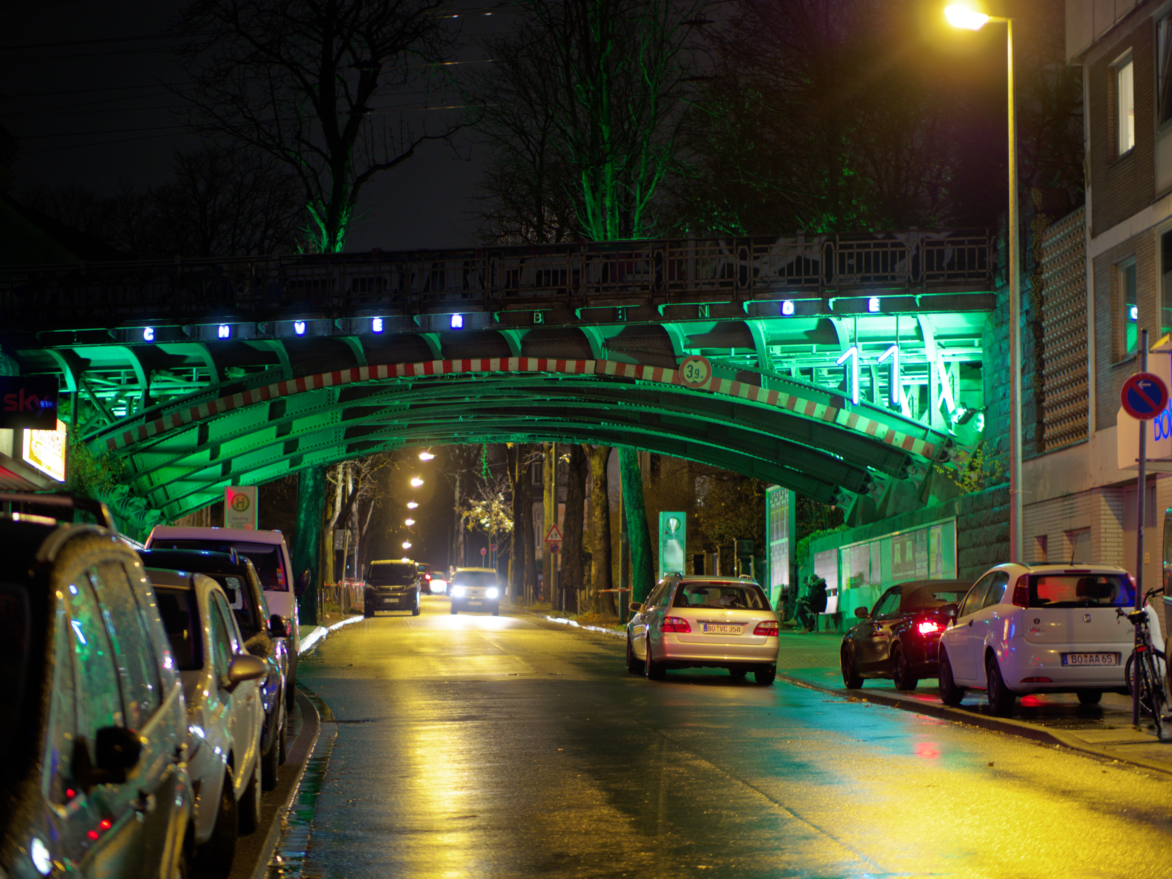 Kunstlichttore sind künstlerisch gestaltete Eisenbahnbrücken, die Zugänge zur Bochumer Innenstadt bilden. Kunstlichttor Nr. 11, grün beleuchtete Brückenunterseite mit der Zahl 11 auf der jeweils rechten Seite. Künstler: Peter Brdenk und Jürgen LIT Fischer.